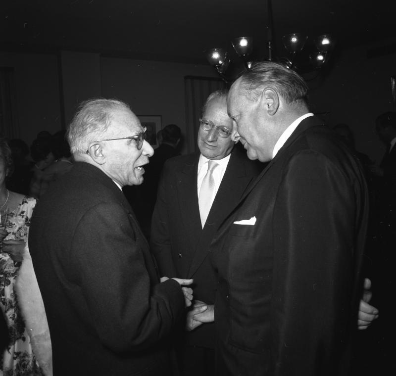 Essen von Staatssekretär Strauß für den Vicepräsidenten des ital. Verfassungsgerichtshofes, Prof. Ambrosini, im Bundesjustizministerium